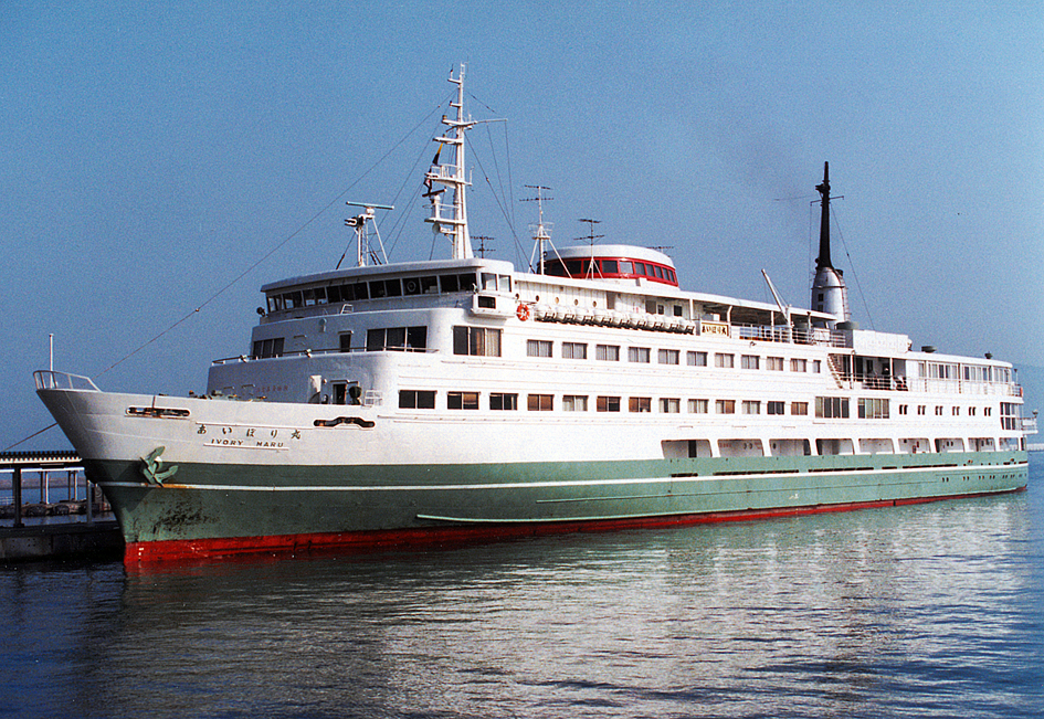 関西汽船 あいぼり丸